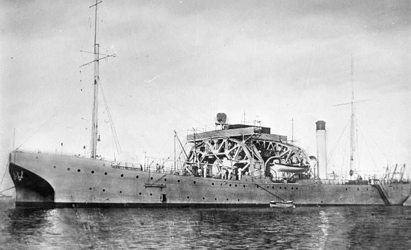 U-Boothebeschiff "SMS Vulkan" U-Boothebeschiff "S.M.S. Vulkan"